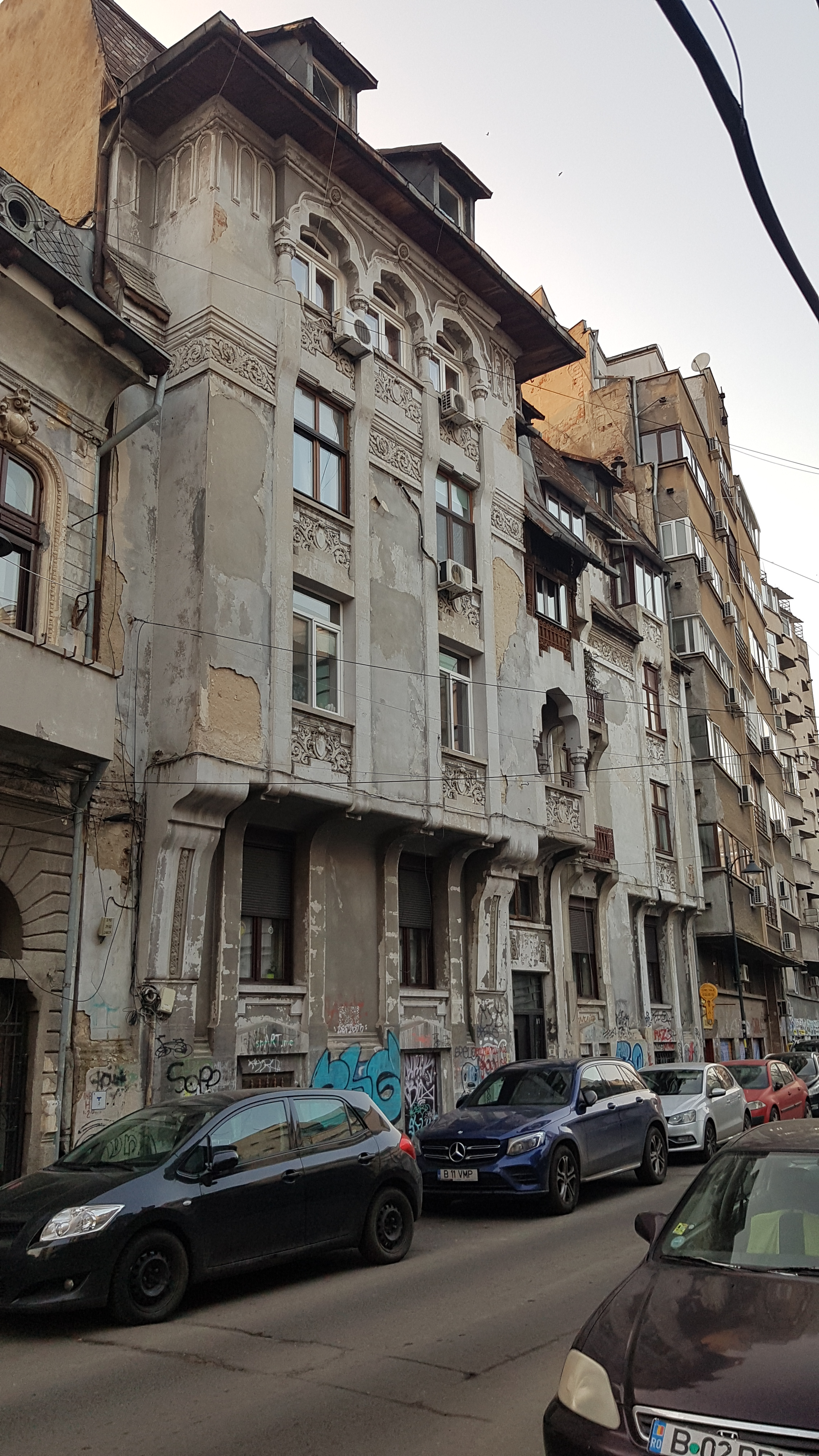 Casă, monument istoric